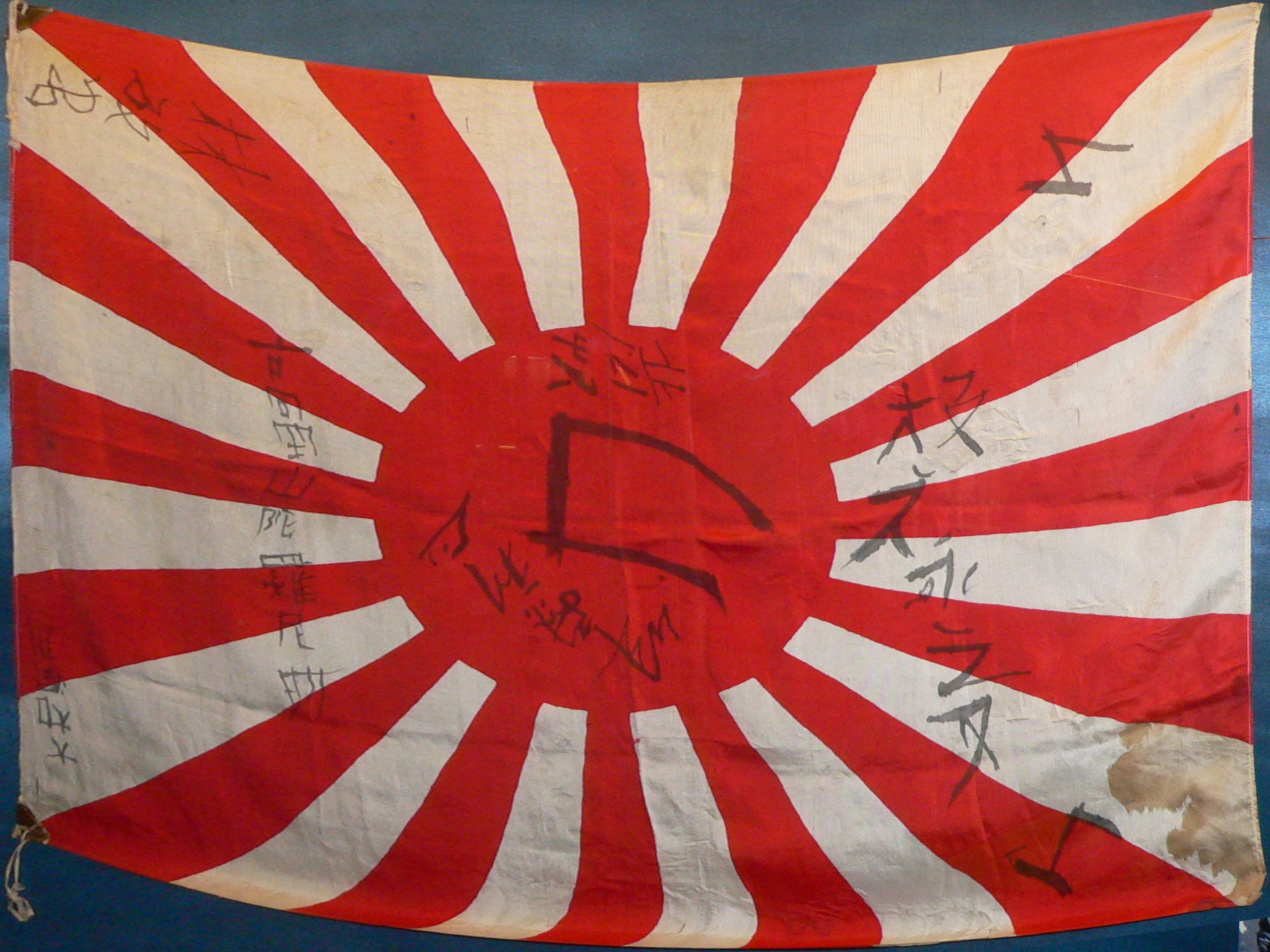 Drapeau japonais de la Seconde Guerre Mondiale, portant des inscriptions des membre son unité.